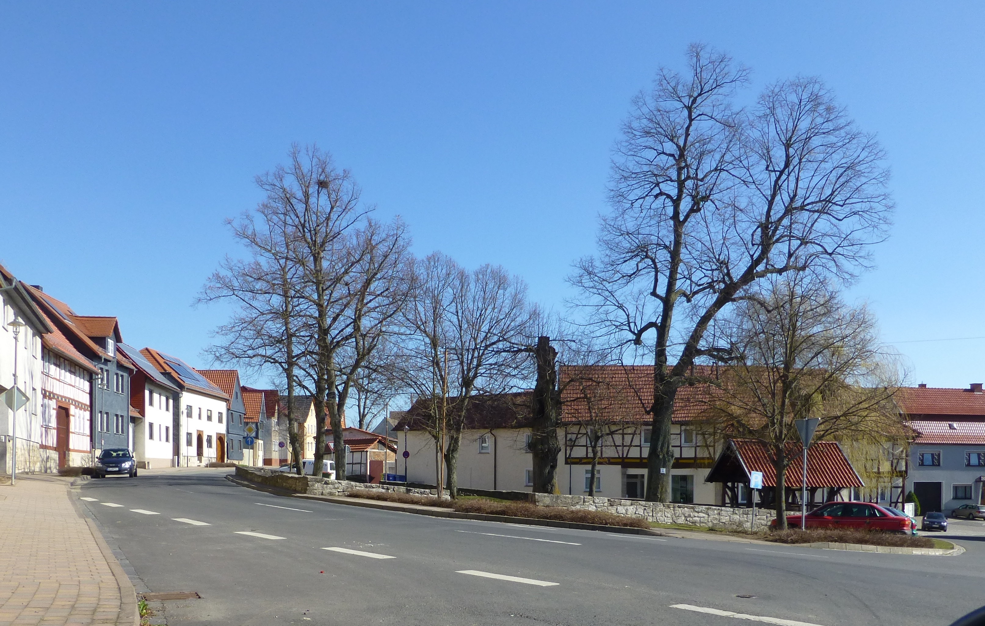 Der Anger in Beberstedt